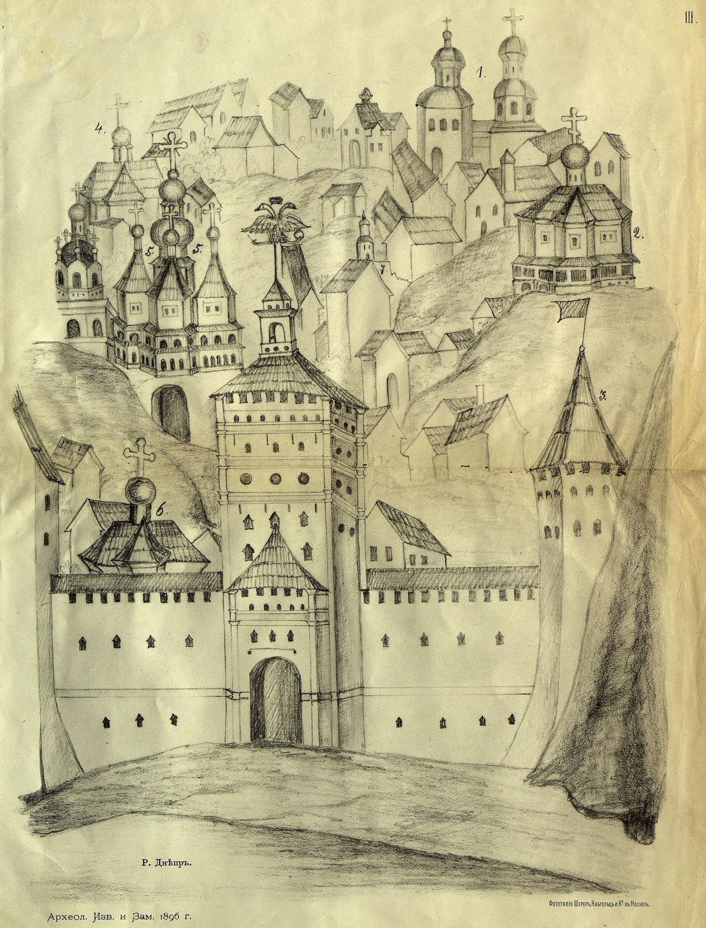 Беларуская (тарашкевіца): Смаленск (Smalensk). Панарама места з абраза Аўрама і Мяркурыя Смаленскіх